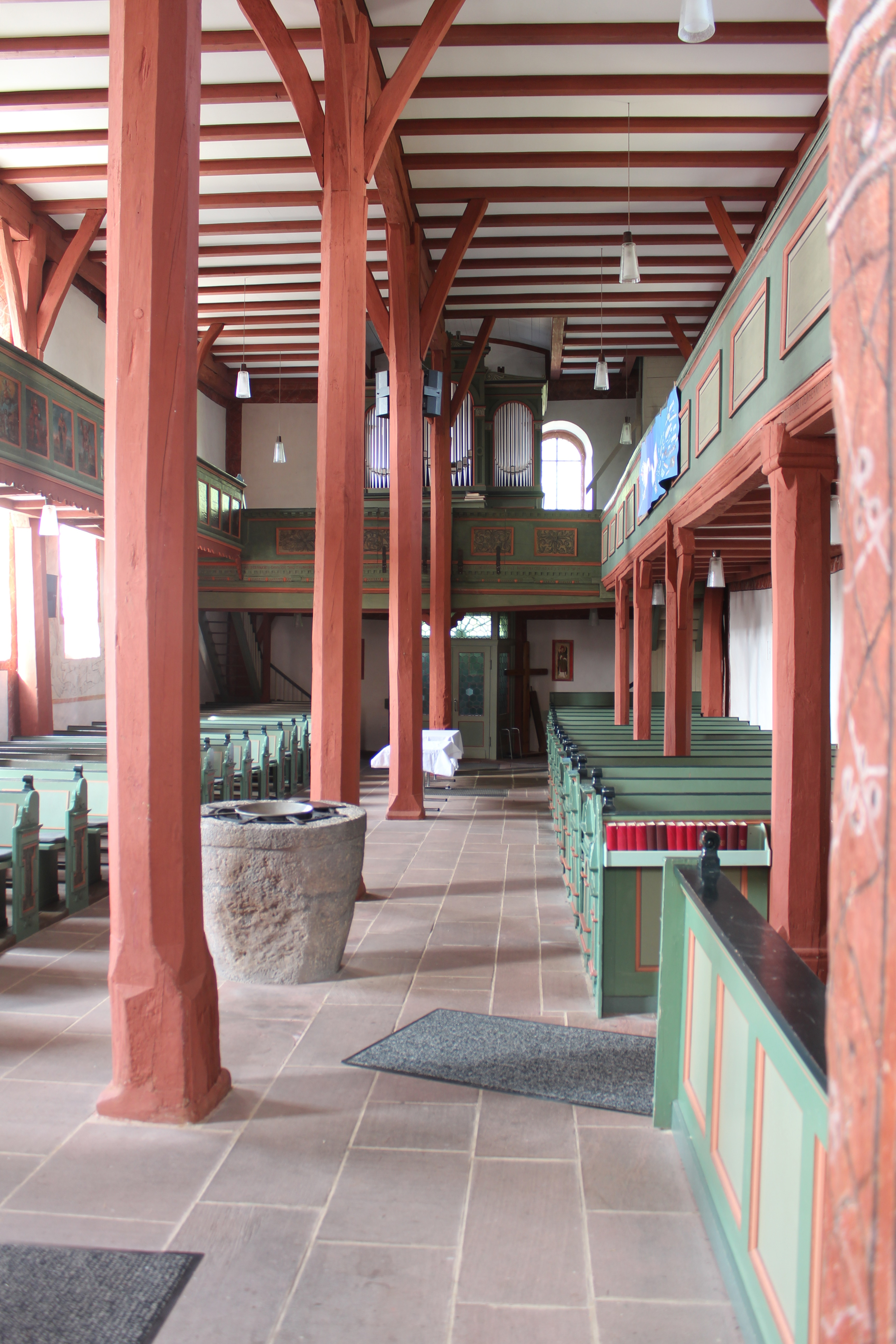 Blick aus dem Kirchenschiff zur Orgelempore der Evangelischen Kirche zu Hohenahr-Erda